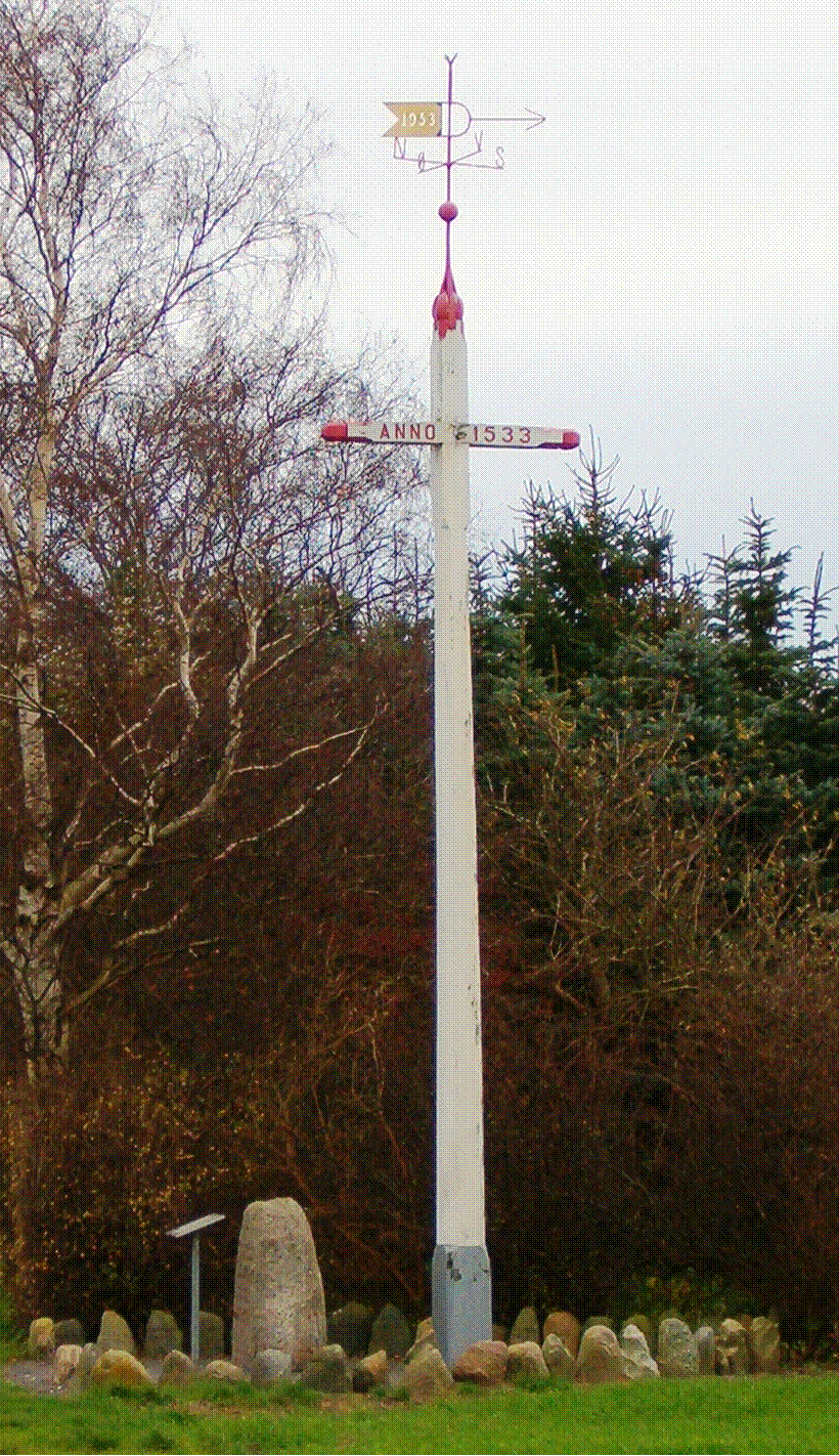 Foto af Skalkekorste i Frejlev - Lolland - Nystedegnen